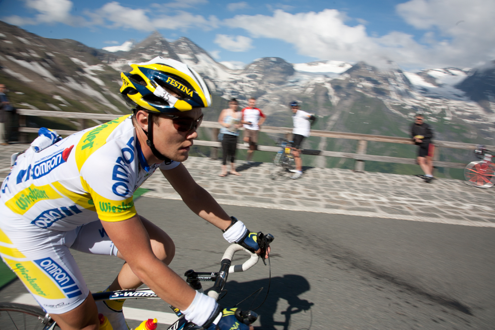 Christoph Strasser 2008 am Fuschertoerl